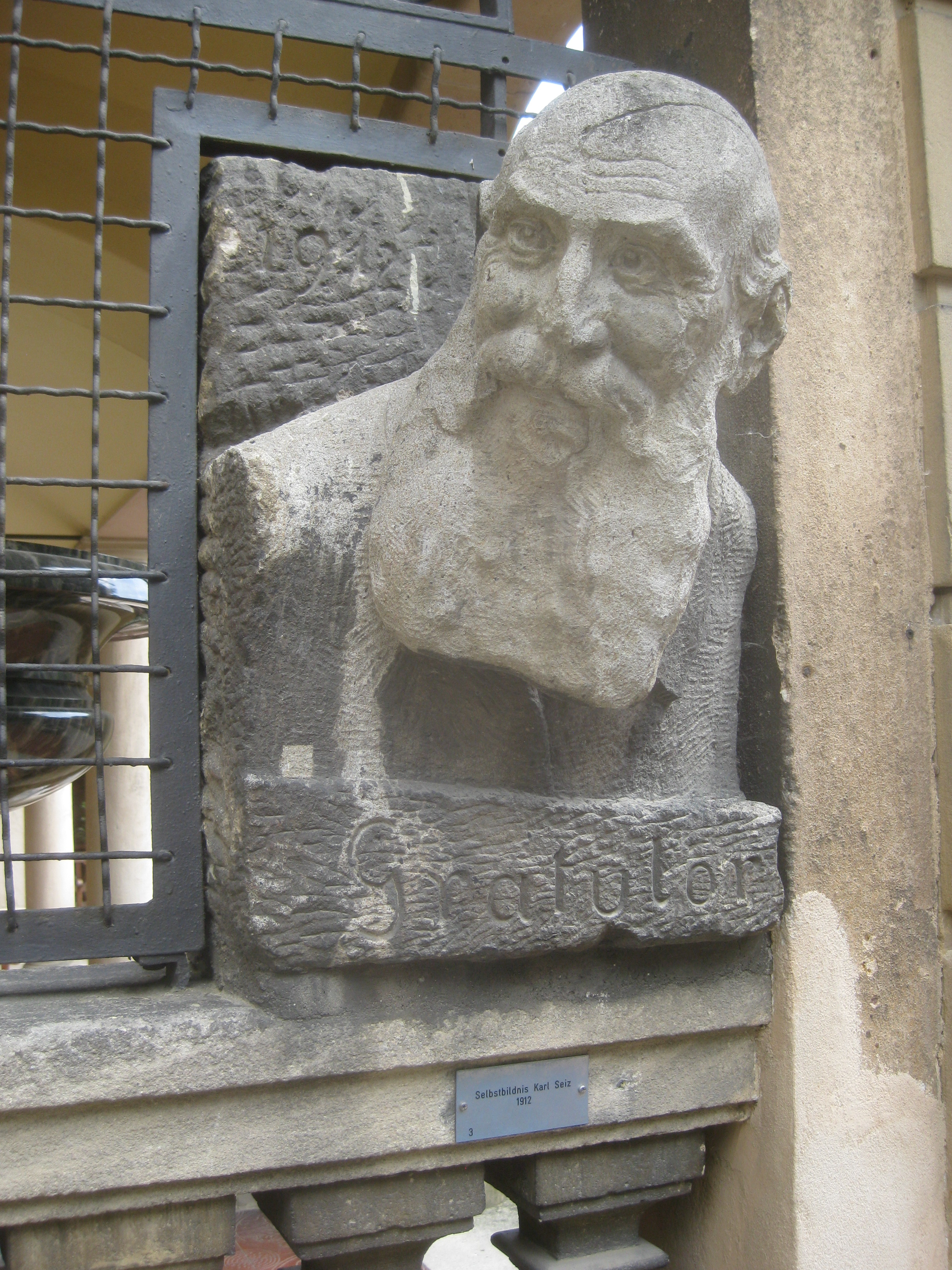 Bärtiger Männerkopf „Gratulor“ von Karl Seiz, 1912, Städtisches Lapidarium Stuttgart, Nr. 03.